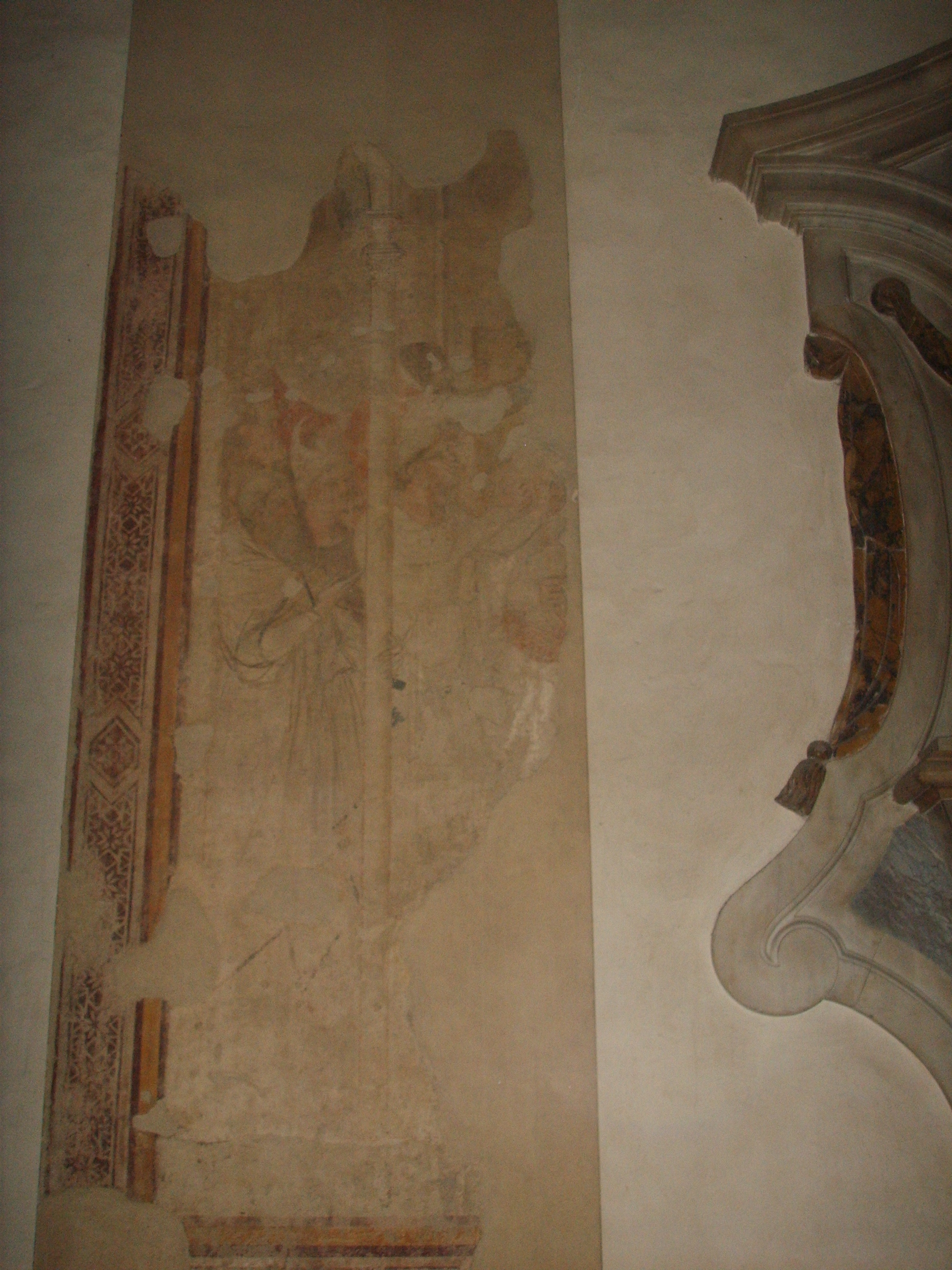 Badia Fiorentina church nardo_di_cione_(attribuzione),_cappella_di_san_bernardo in Florence, italy